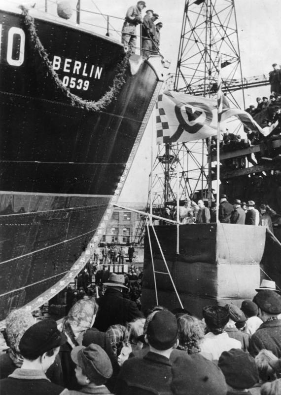 Bremen, Taufe eines Fischdampfer Berliner Kinder sehen den Stapellauf des Fischdampfers "Berlin" Auf der Vulkan-Werft in Bremen wurde der neueste 400-Tonnen Fischdampfer durch den Berliner Bürgermeister Dr. [Ferdinand] Friedensburg auf den Namen "Berlin" getauft. Zahlreiche Berliner Kinder, die sich zur Zeit in den Westzonen von den durch die Blockade erlittenen Entbehrungen erholen, wohnten dem Taufakt bei. Unser Bild zeigt den Taufakt durch Dr. [Ferdinand] Friedensburg. Im Vordergrund die Berliner Kinder. 9-4-49 Illus-dpd Abgebildete Personen: Friedensburg, Ferdinand Prof. Dr.: Stellvertretender Oberbürgermeister von Berlin-West, Bundesrepublik Deutschland (GND 118693425)